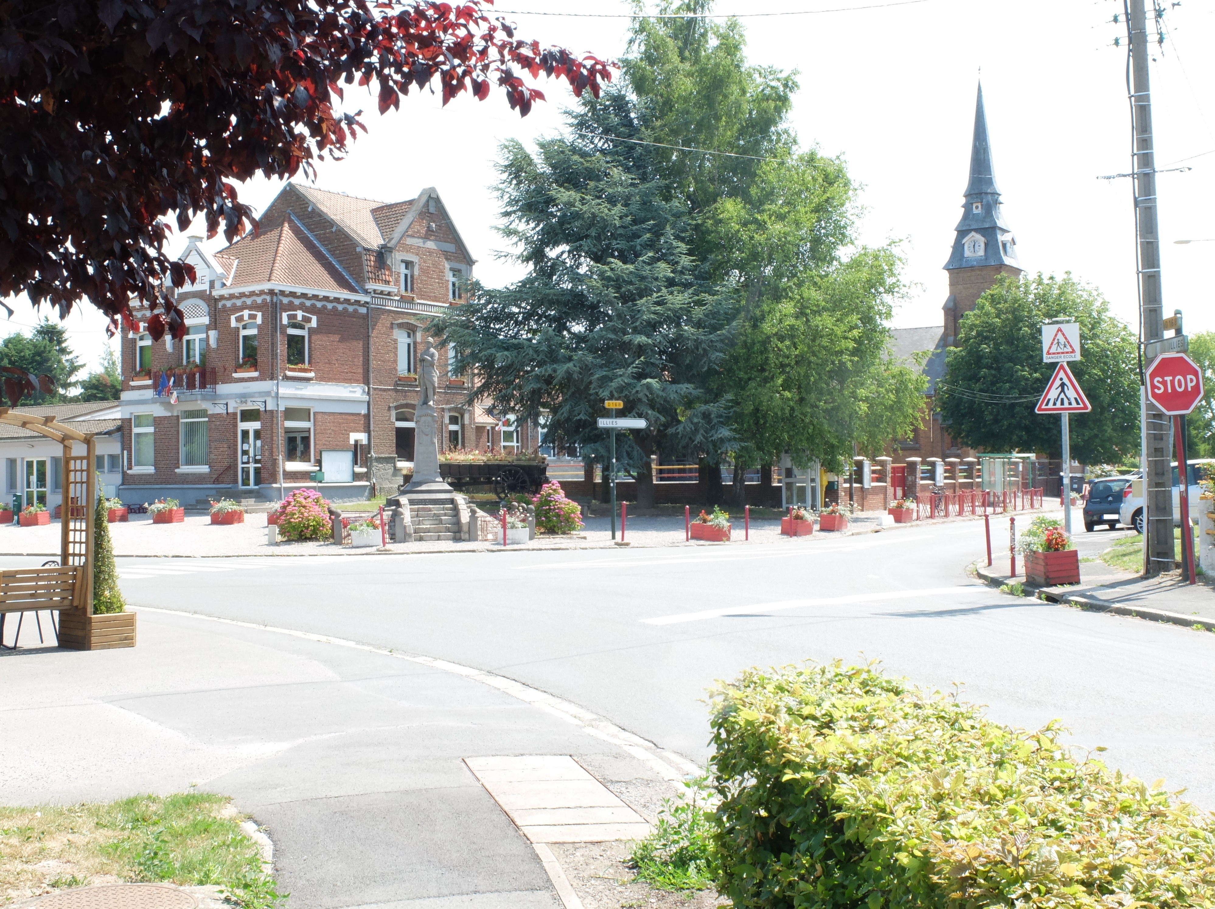 Vue du centre de Lorgies, la mairie et l'église figurent sur l'image.